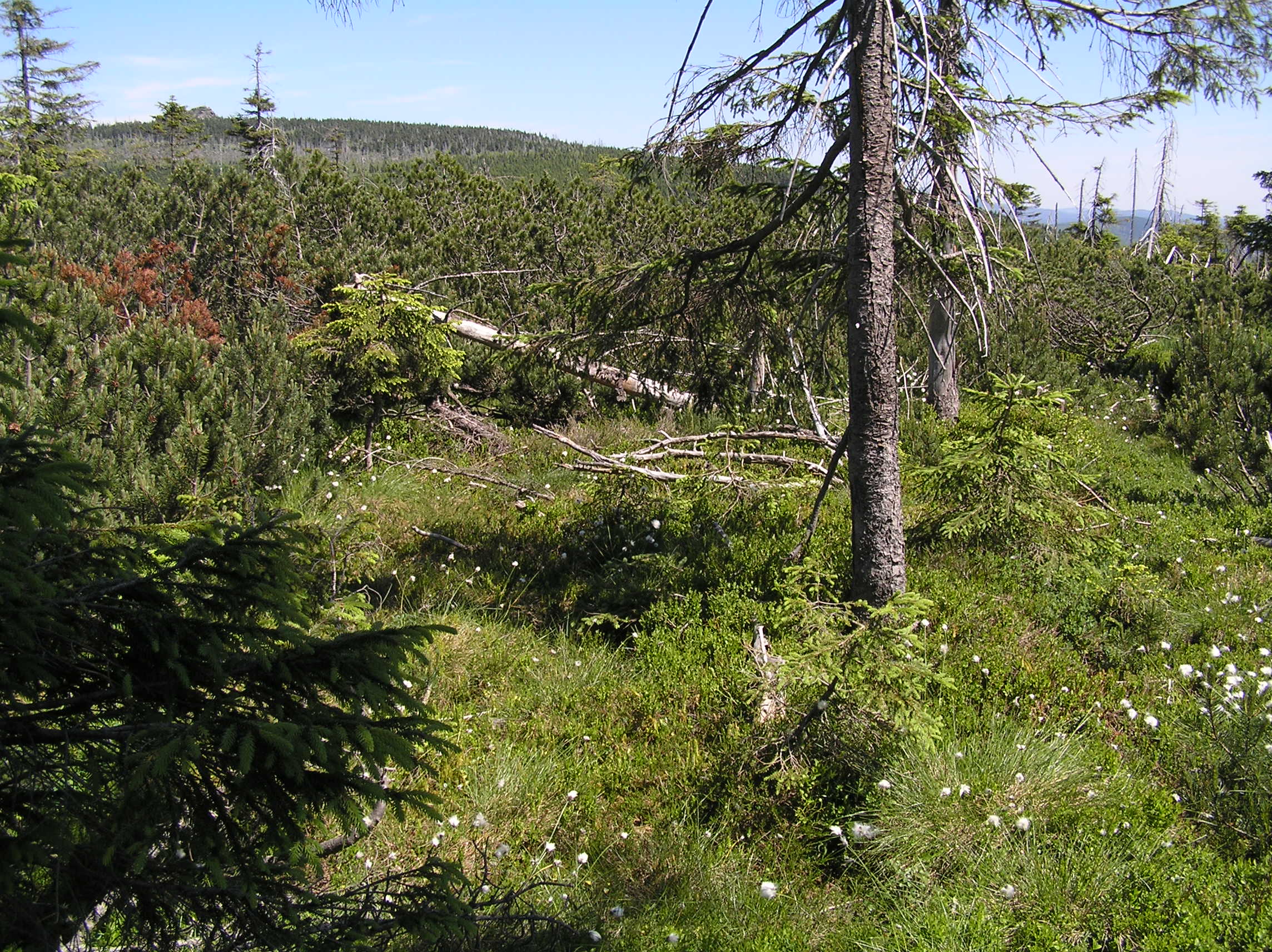 PP Na kneipě